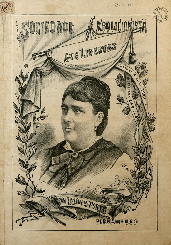 Leonor Porto é mostrada no jornal de acordo com Luzilá Ferreira como uma venerável matrona, vestido de gola alta, cabelos presos. É retratada como uma chefe, mas ao invés de uma figura masculina é uma mulher. Nota-se pelos traços, brincos e o vestido é enfeitado por laço e rendas. Seu retrato possui de um lado ramos de louro, que remete a vitórias, enquanto do outro lado podemos observar galhos de carvalho, que remete a força e resistência. Acima de Leonor está a bandeira da Sociedade, como um símbolo de proteção.